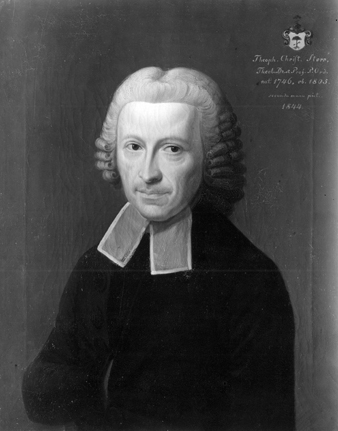 Theophil Christian Storr, Bildnis aus der Tübinger Professorengalerie (Öl auf Leinwand, 72,5 × 59,5 cm)